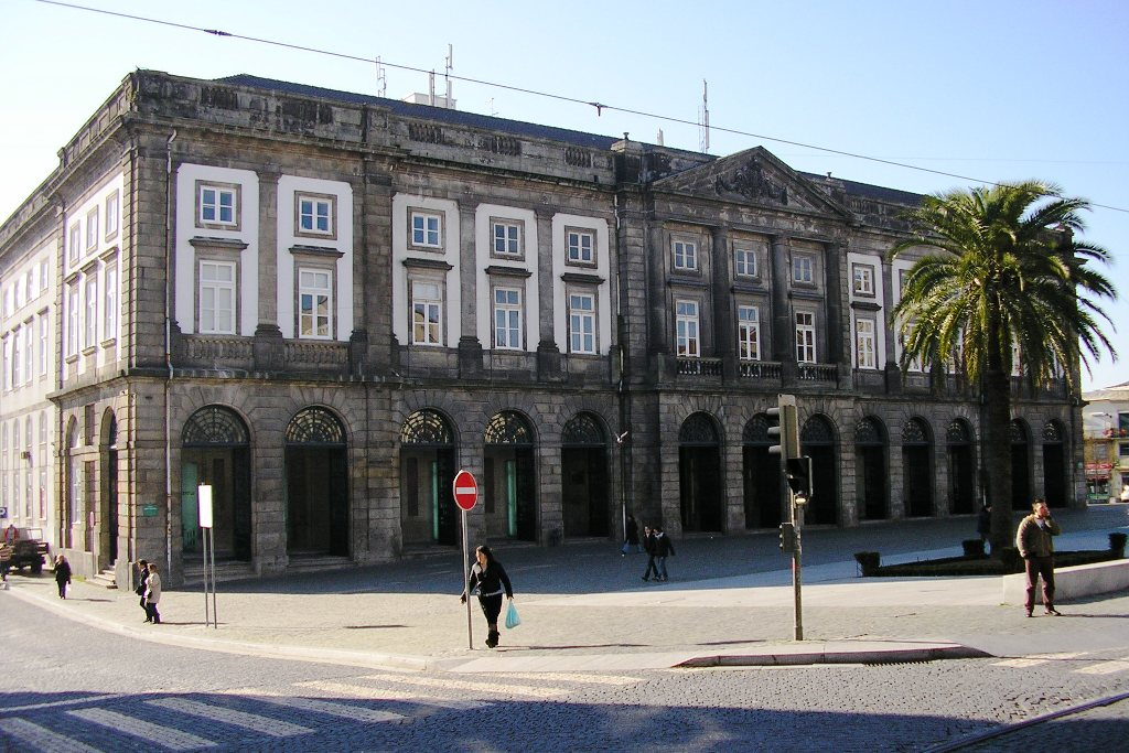 University of Porto early building / Museu de História Natural da Faculdade de Ciências. In Porto, Portugal.